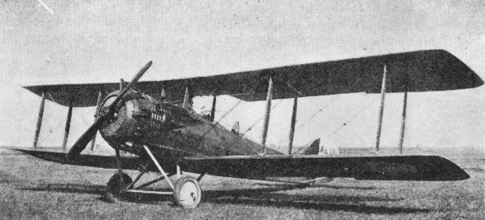 Francuski samolot rozpoznawczo-bombowy Salmson 2.